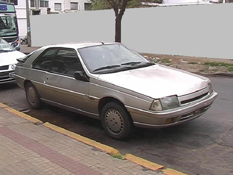 Argentinian built Renault Fuego GTA Max